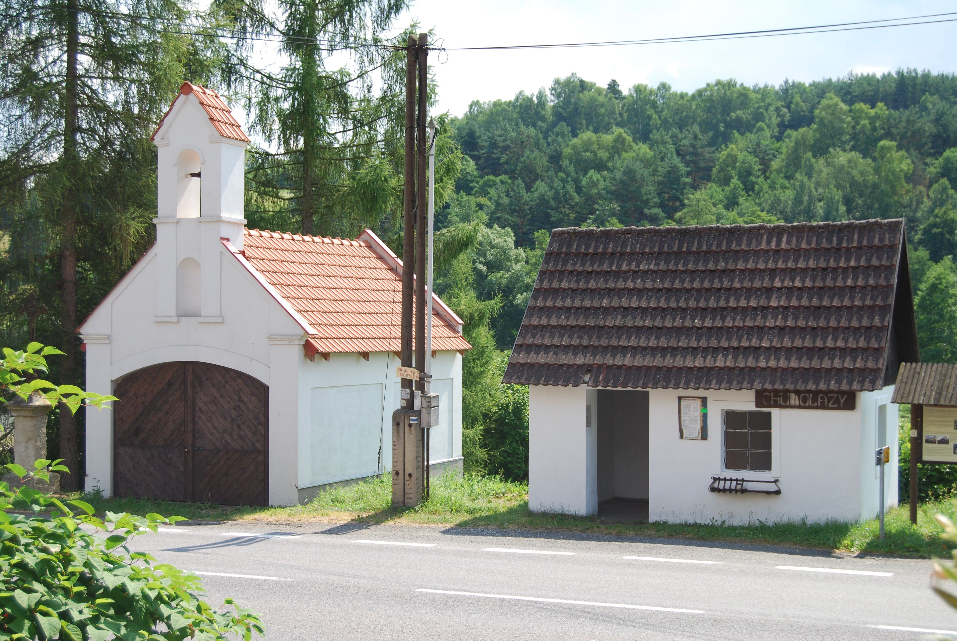 Kaple se zvoničkou, hasičská zbrojnice a autobusová zastávka. Chudolazy je část obce Medonosy v okrese Mělník. Česká republika.